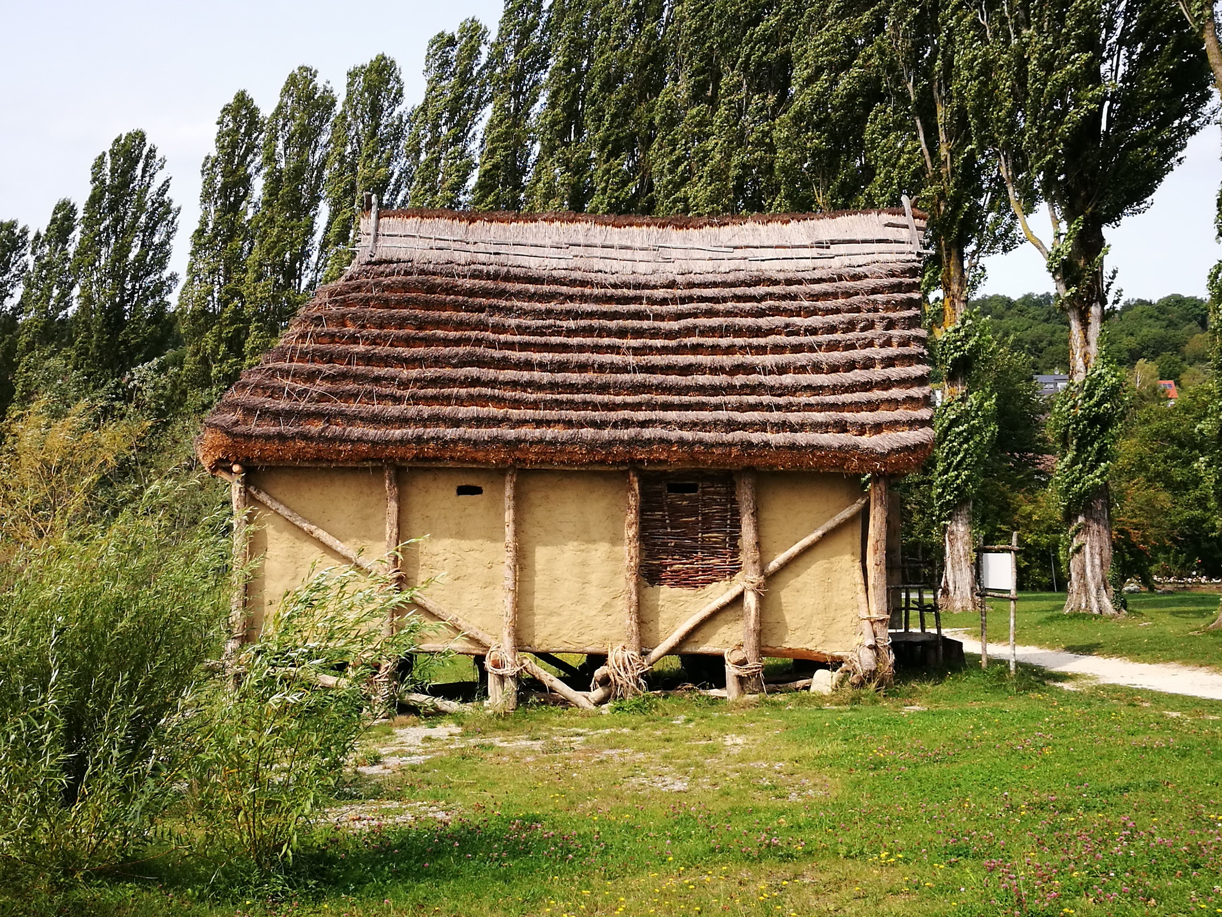 Deutschland (D) - Baden-Württemberg (BW) - Landkreis Konstanz (KN) - Öhningen - Wangen: Rekonstruktion eines Pfahlbauhauses Relativ "naturgetreue" Nachbildung eines steinzeitlichen Hauses, ähnlich den Häusern, die in der Jungsteinzeit vor rund 5.500 Jahren gebaut wurden; heutigen statischen Vorschriften angepasst.